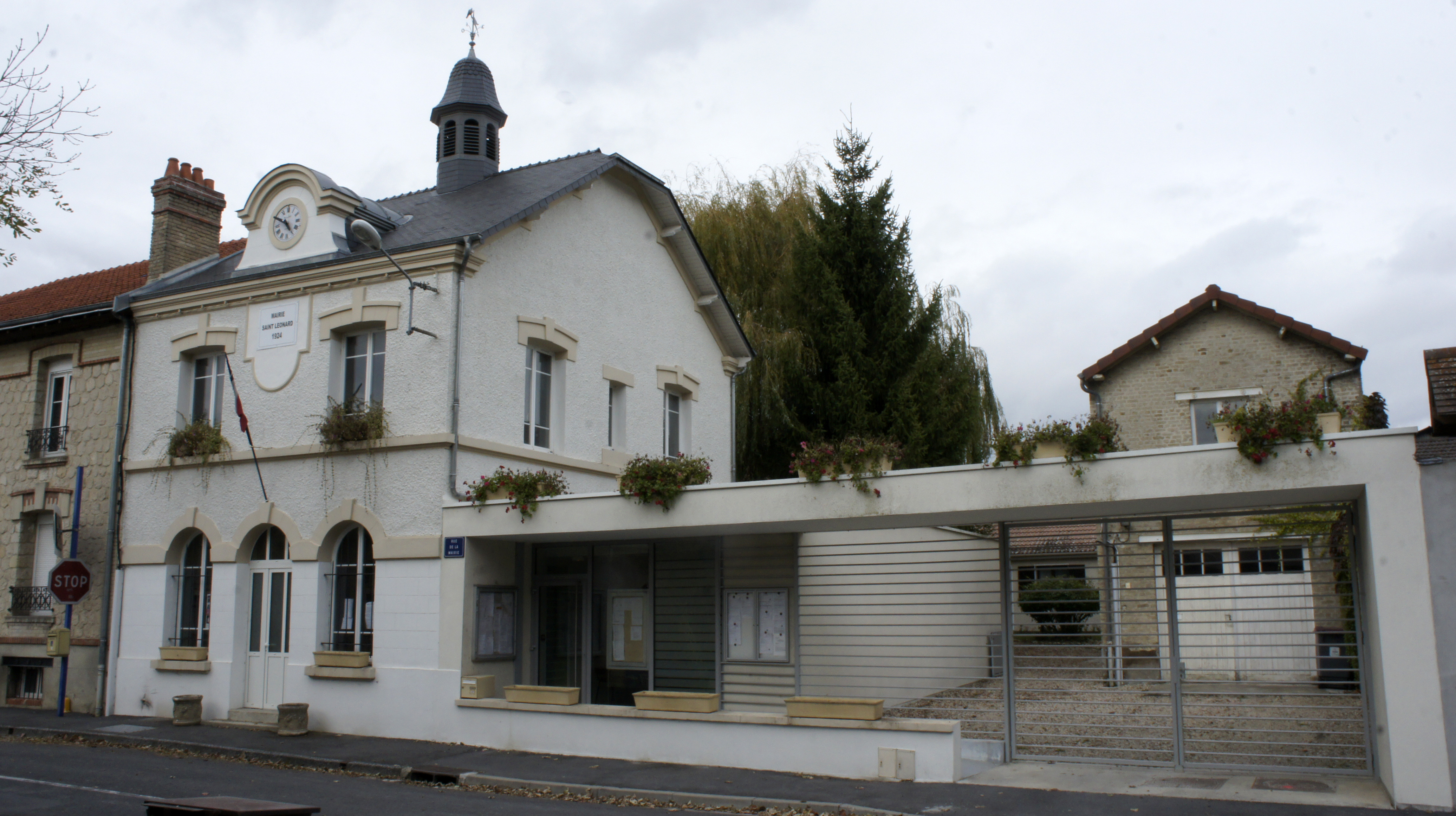 UNe vue de la Mairie_de st_Léonard.